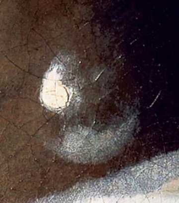 détail de la perle que porte le modèle après restauration de l'oeuvre